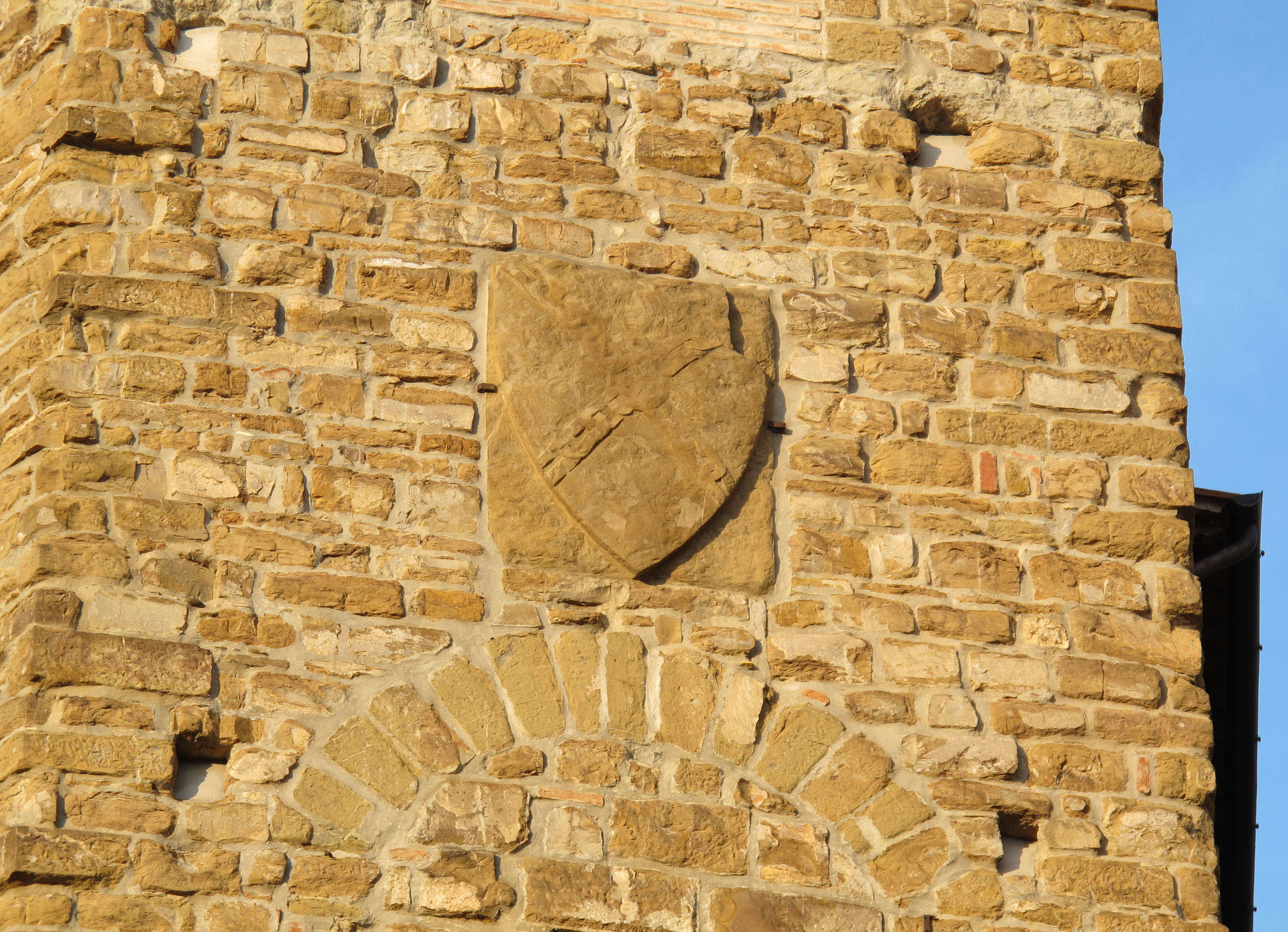 Torre degli alberti, fi, 02 stemma alberti